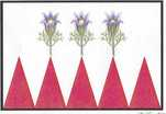 Česky: vlajka obce Krčmaň